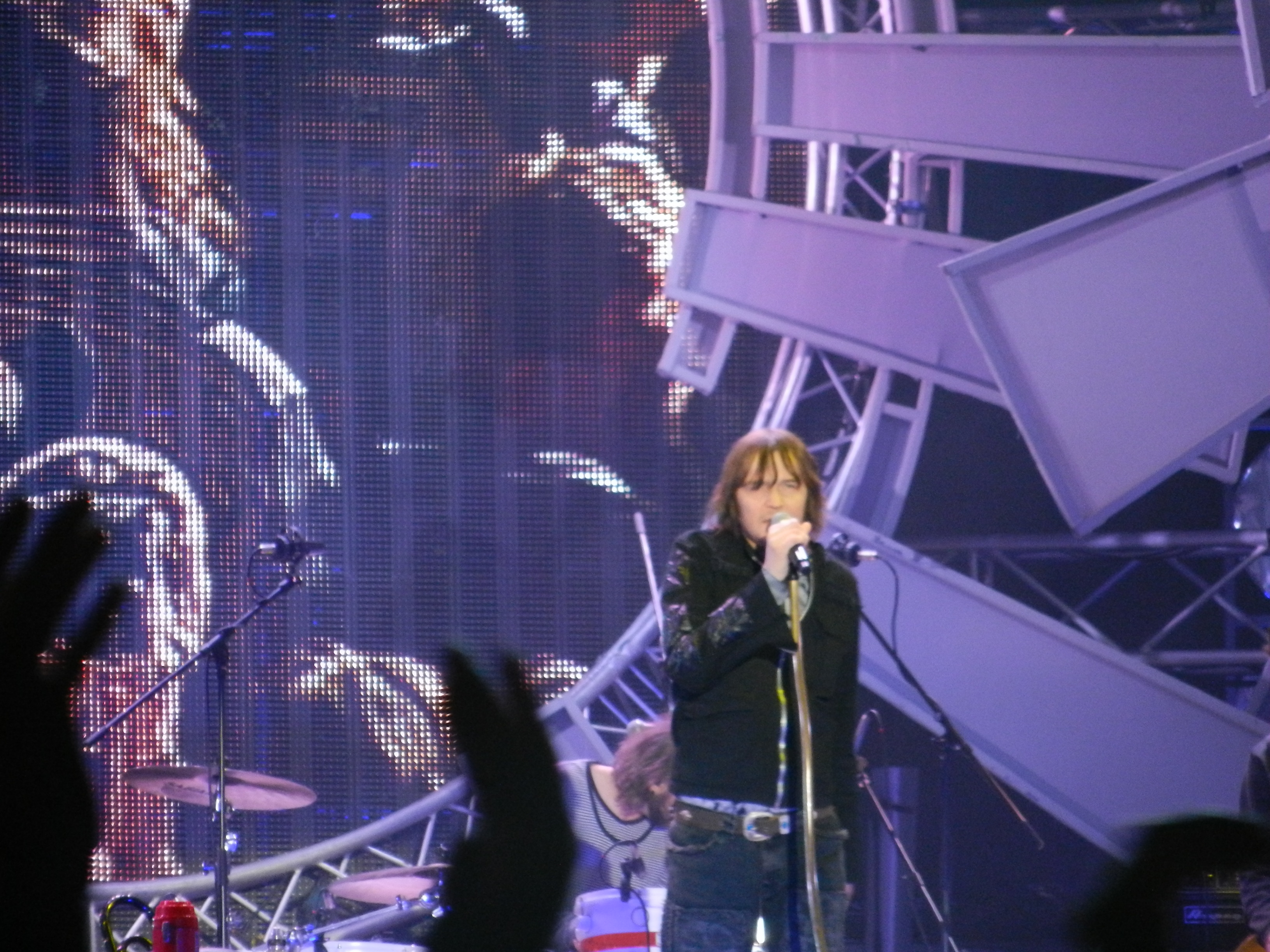 Robert Gawliński podczas koncertu "Wianki nad Wisłą 2011", Podzamcze, Warszawa 25.06.2011.